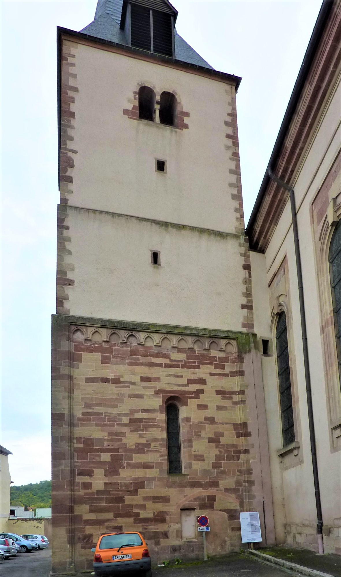 Église Saint-Étienne (Rosheim)